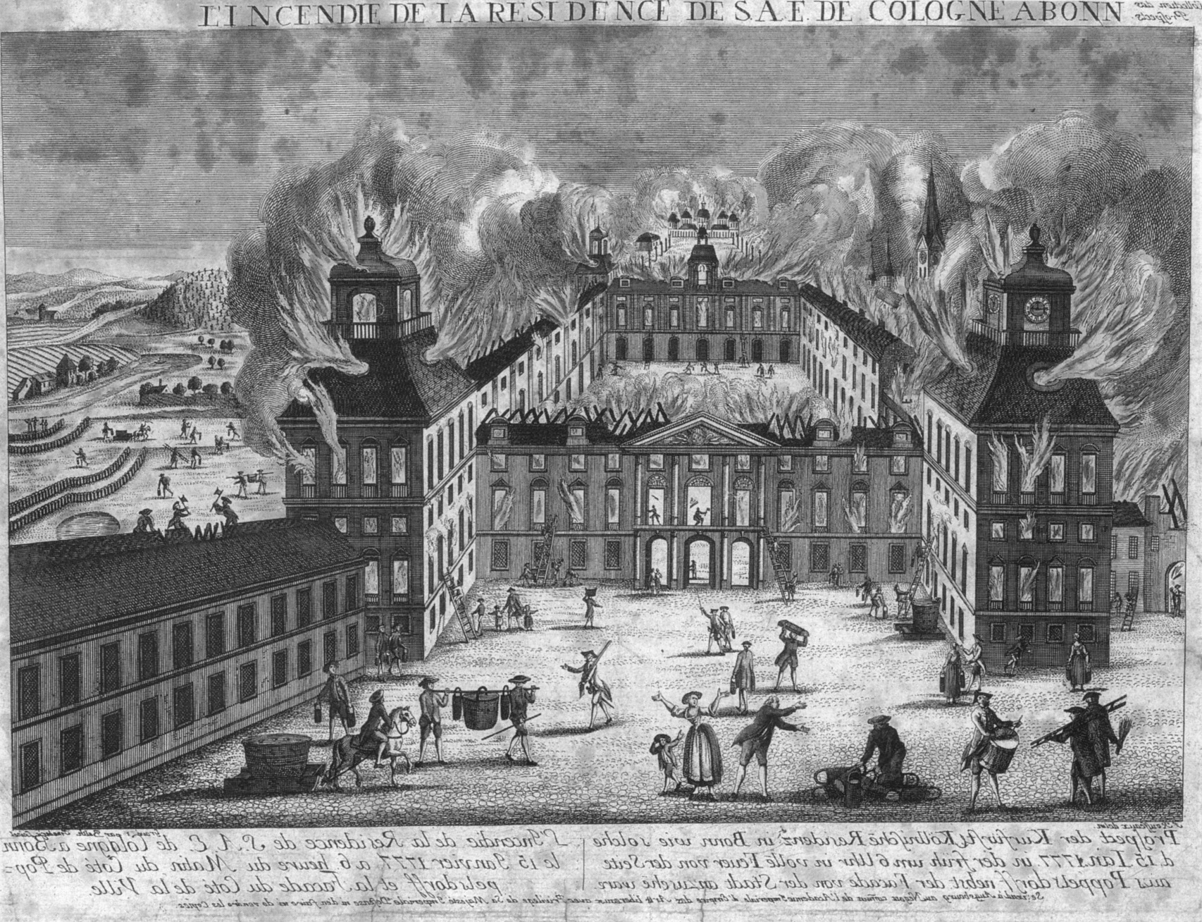 Brand der kurfürstlichen Residenz in Bonn am 15. Januar 1777